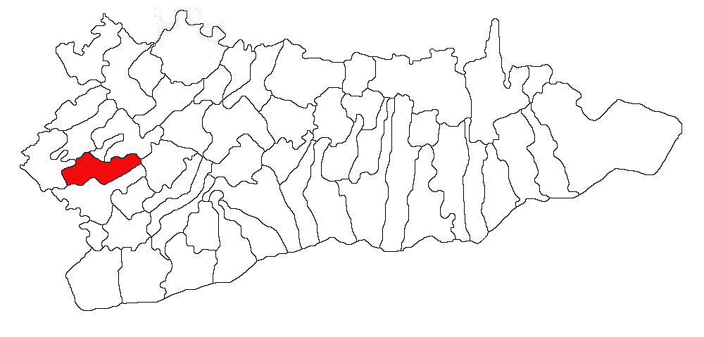 Categorie:Hărţi ale judeţului Călăraşi